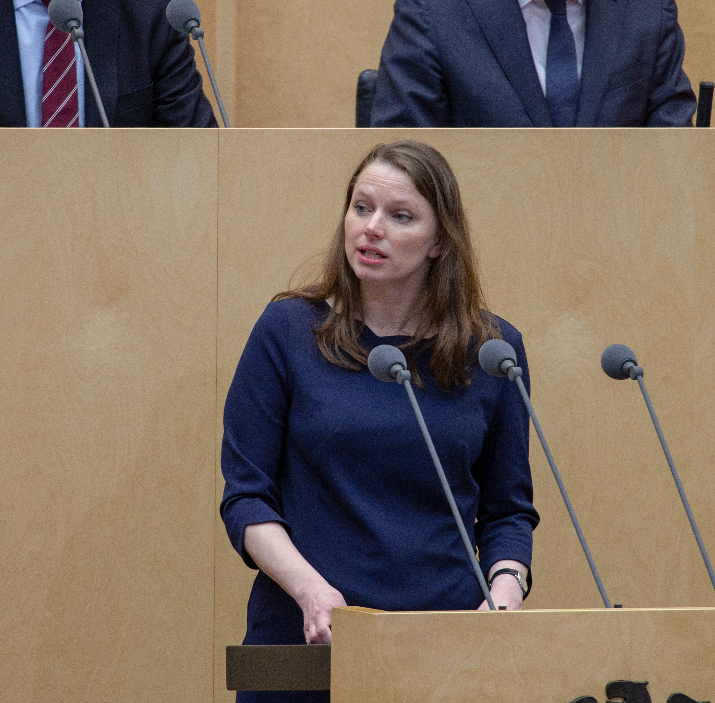 Plenarsitzung des Bundesrates am 12. April 2019 in Berlin.